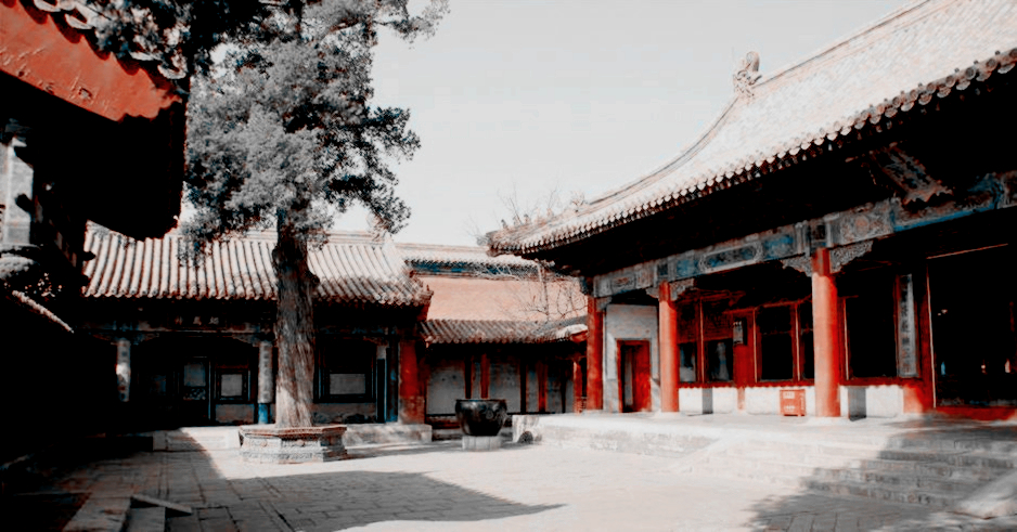 Een foto gemaakt in de Verboden stad.钟粹宫